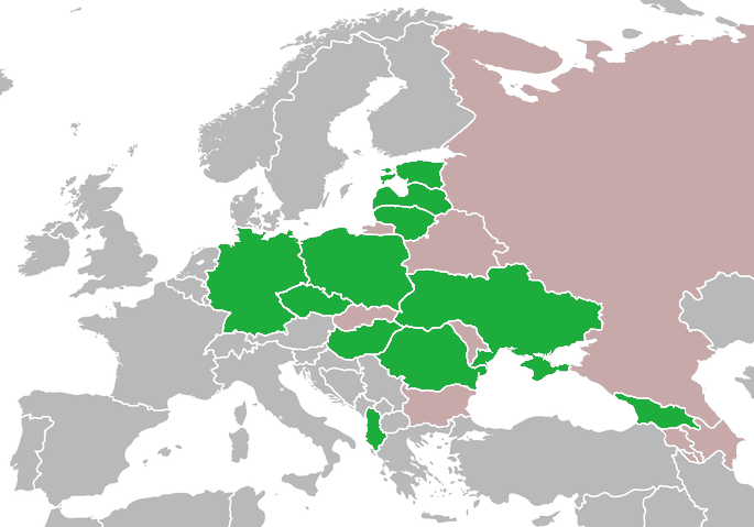 Страны, где проводилась или проводится люстрация власти (показаны зеленым цветом). Источники информации. Бледно-розовым показаны страны, которые были участниками Варшавского Договора, но в которых люстрация не проводилась.